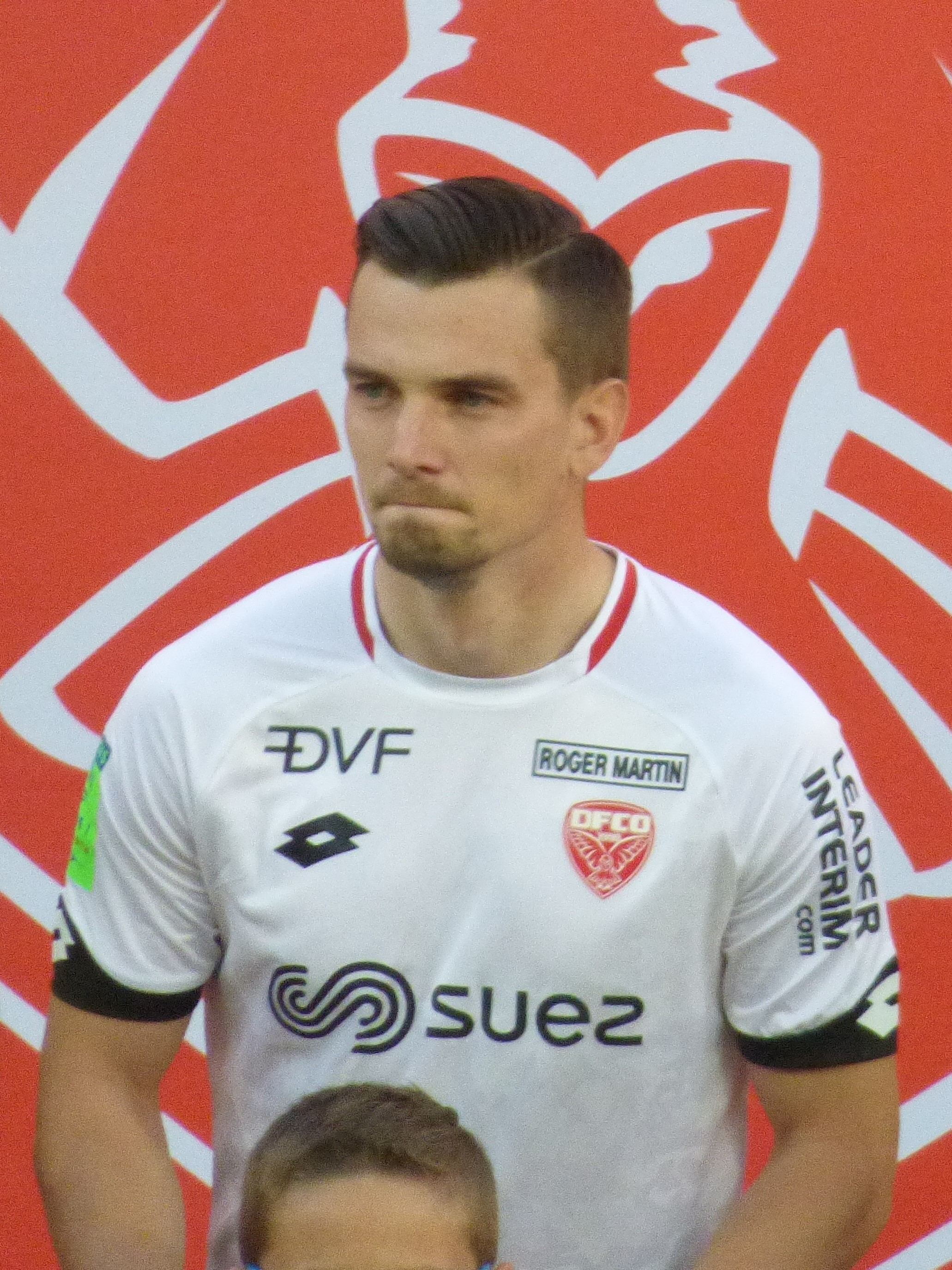 Benjamin Jeannot avant le match RC Lens / Dijon FCO, match aller des barrages pour la montée en Ligue 1 2018-2019, le 30 juin 2019, au Stade Bollaert-Delelis.